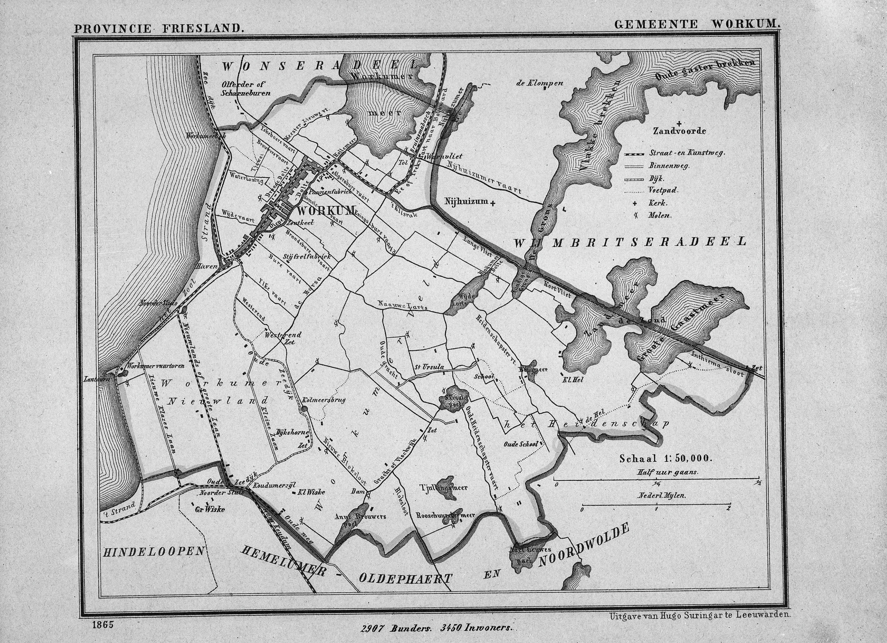 Topografische kaart: Reproductie van topografische kaart (opmerking: Kaart van J. Kuyper)